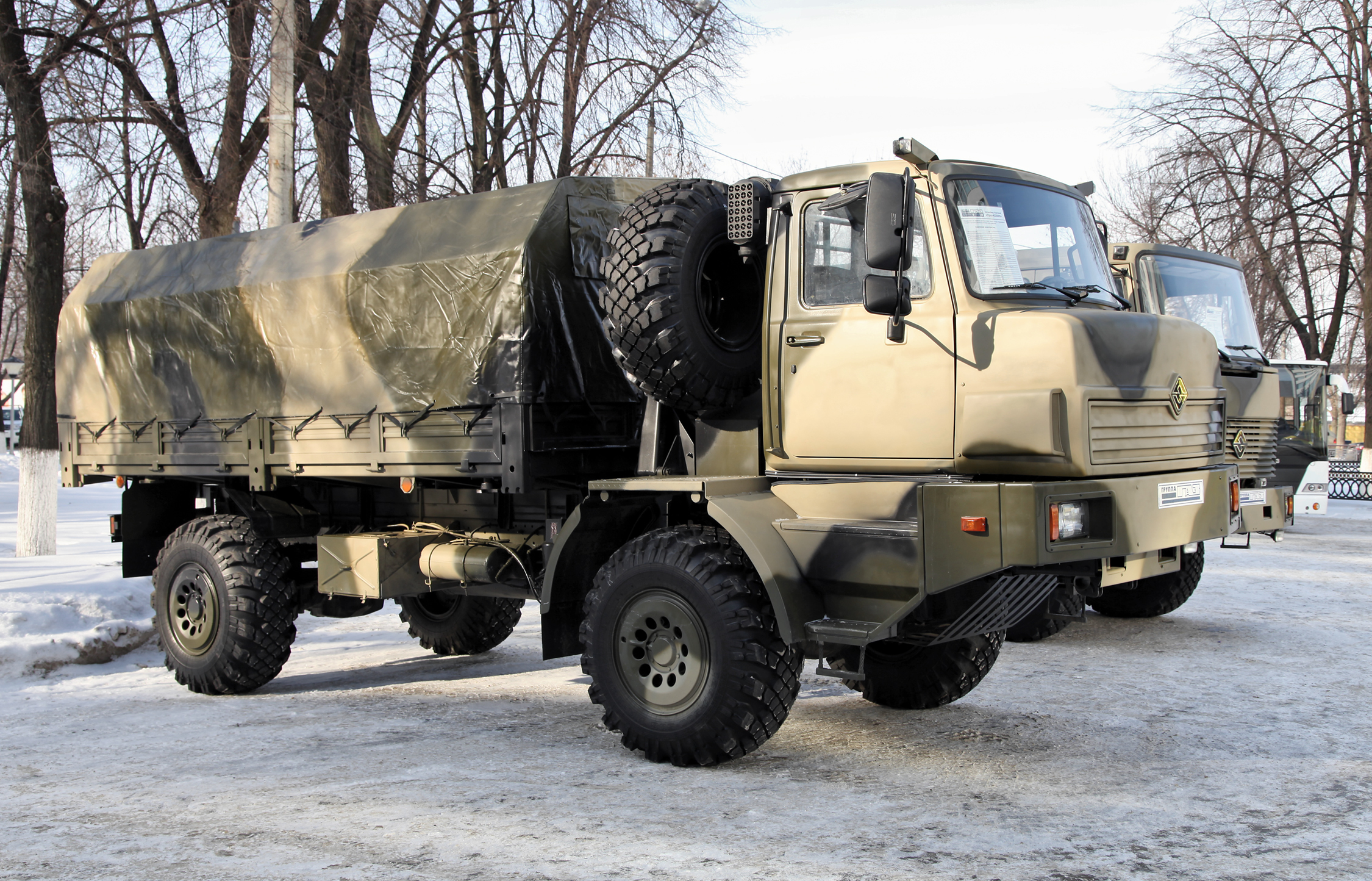 Автомобиль бортовой Урал-432065 (Ural-432065)